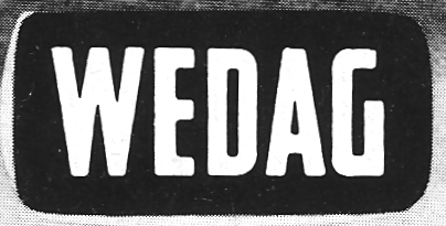 Logo der Westfalia Dinnendahl Gröppel AG, Bochum um 1950